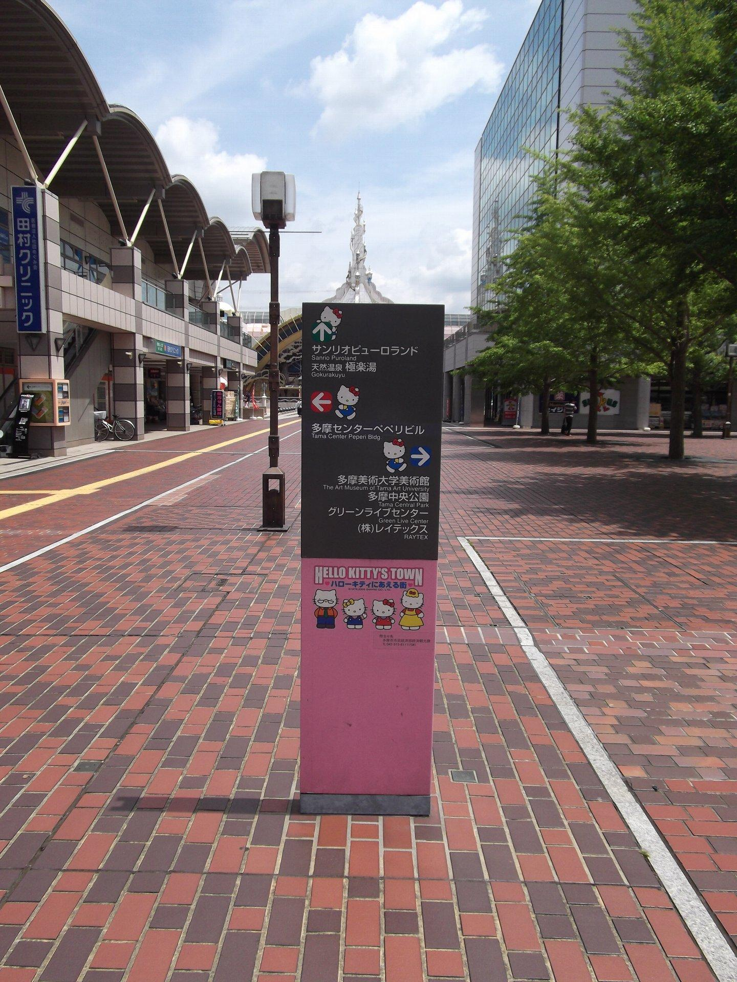 サンリオのキャラクターを活用した案内板。東京都多摩市。